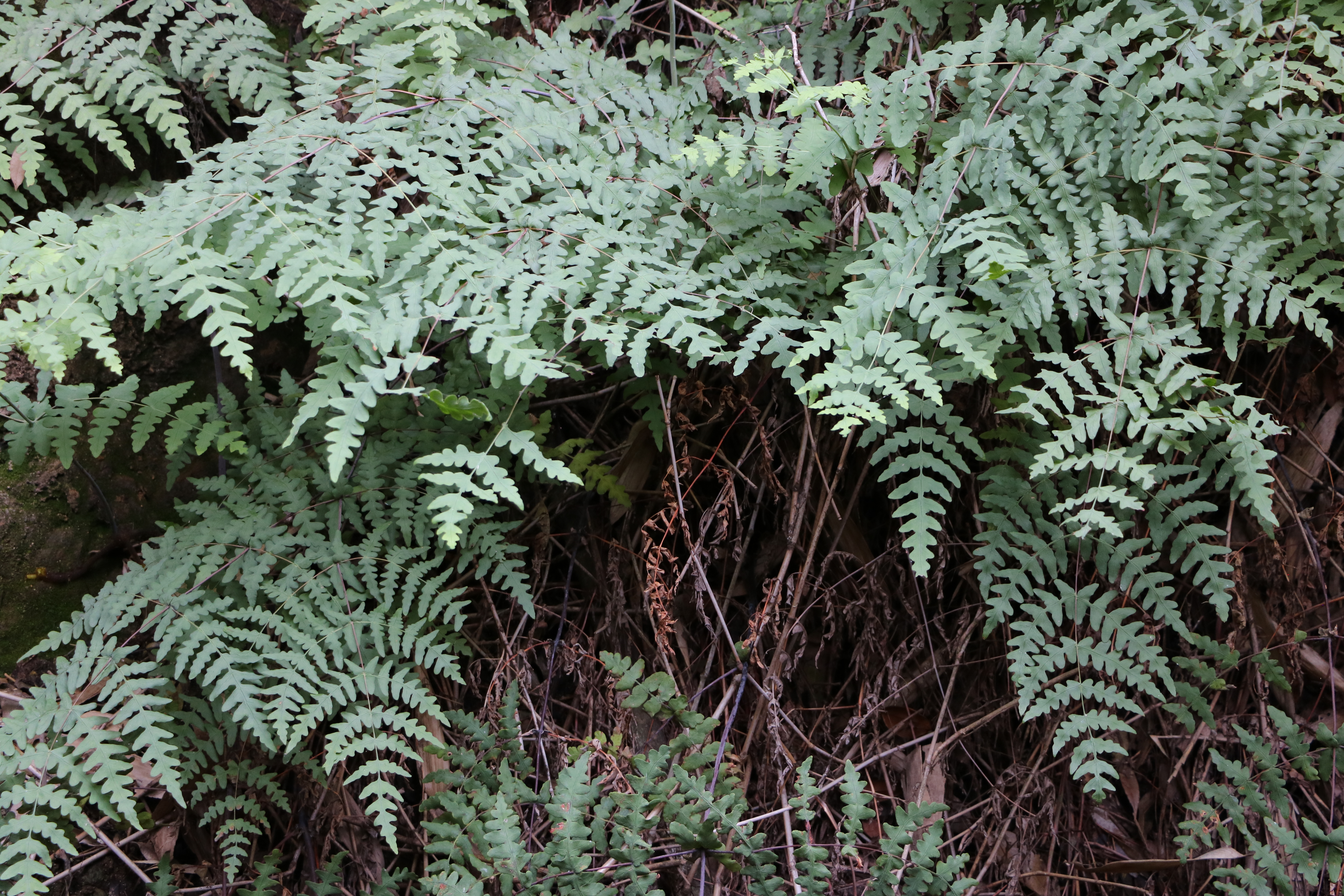 国指定天然記念物ユノミネシダ自生地（和歌山県田辺市本宮町湯の峰温泉）